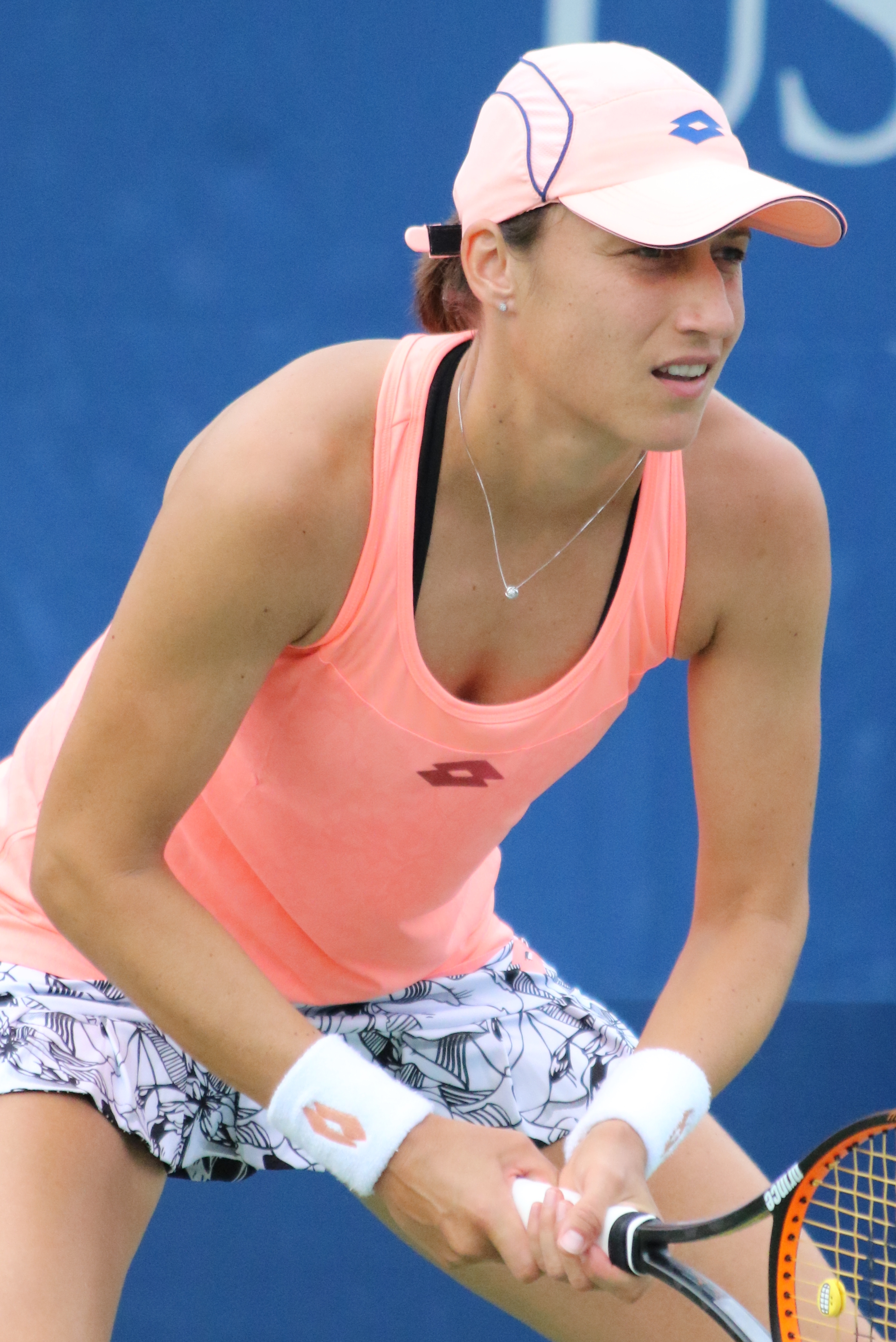 Srebotnik US16 (10)